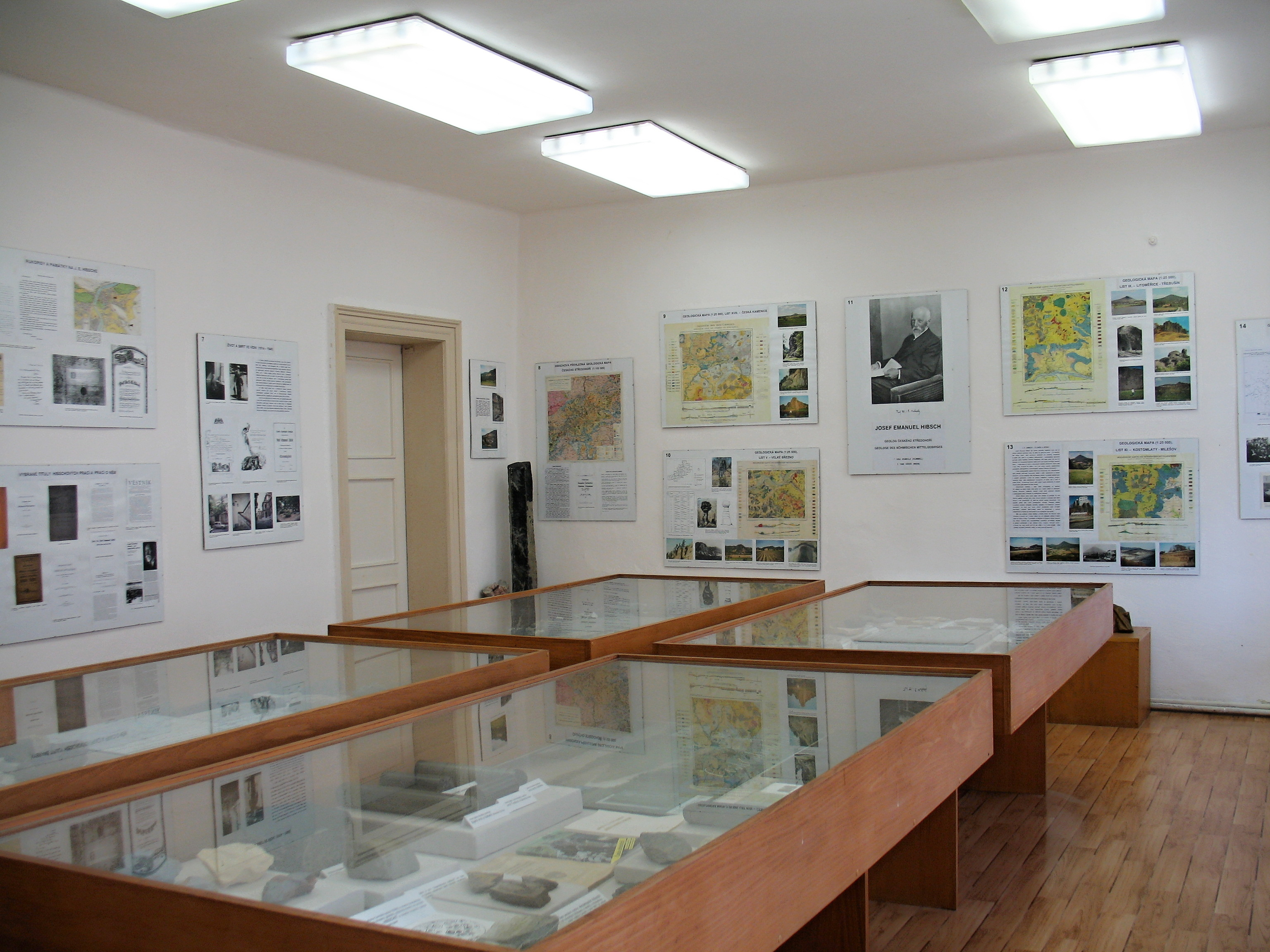 Mineralogické muzeum J. E. Hibsche v Homoli u Panny - interiér muzea